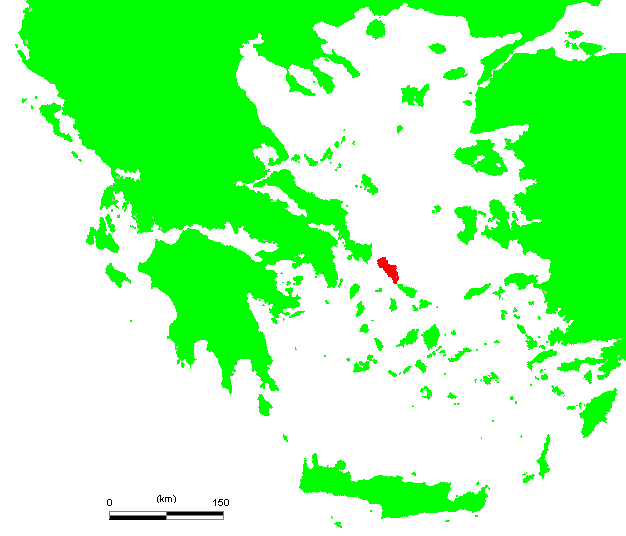 GR Andros.PNG (Greek island)